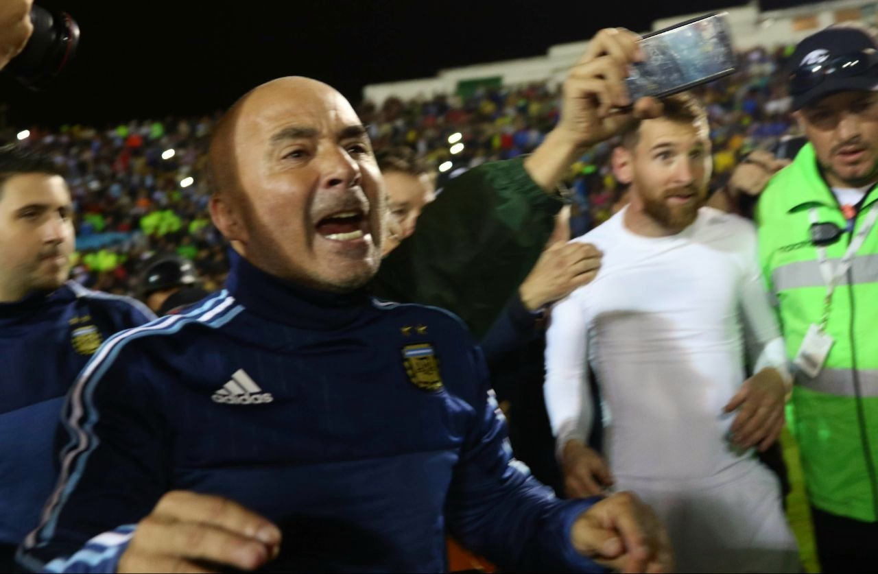 Quito, 10 oct (Andes).- Con tres tantos Argentina espantó los fantasmas de la eliminación, clasificó a su décima octava Copa del Mundo y venció 3-1 a un Ecuador que inició ganando el compromiso, disputado en el estadio Atahualpa de Quito, pero que no supo contener a uno de los mejores jugadores del mundo. ANDES/Micaela Ayala V.